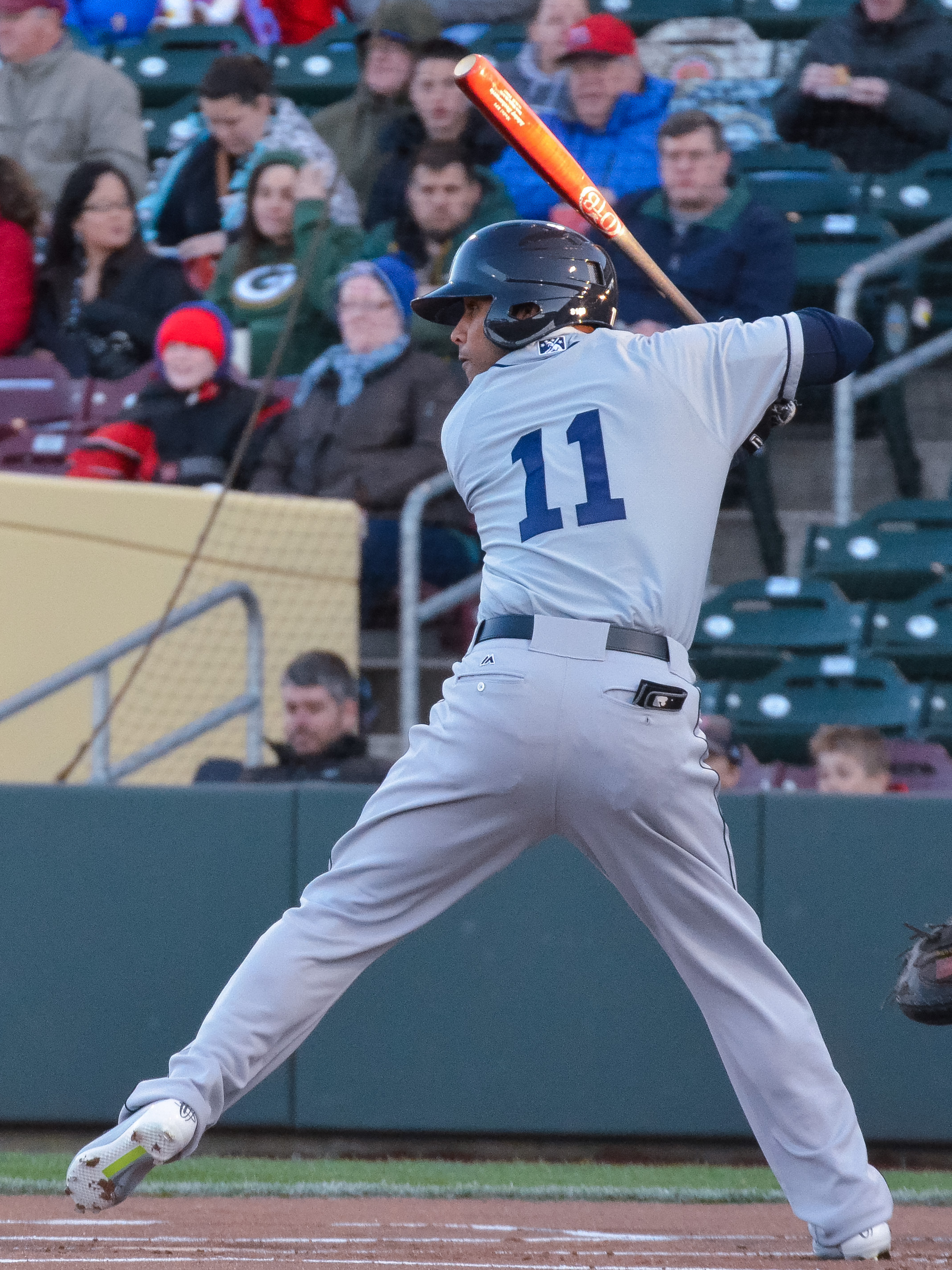 Robert Andino